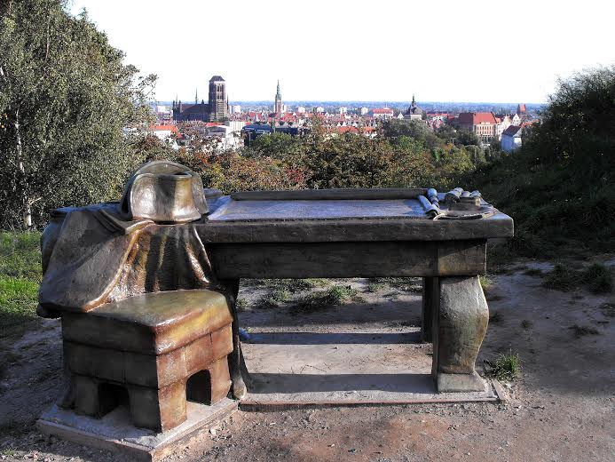 Stół Napoleona na Górze Gradowej w Gdańsku. Autor rzeźby: Jacek Łuczak.